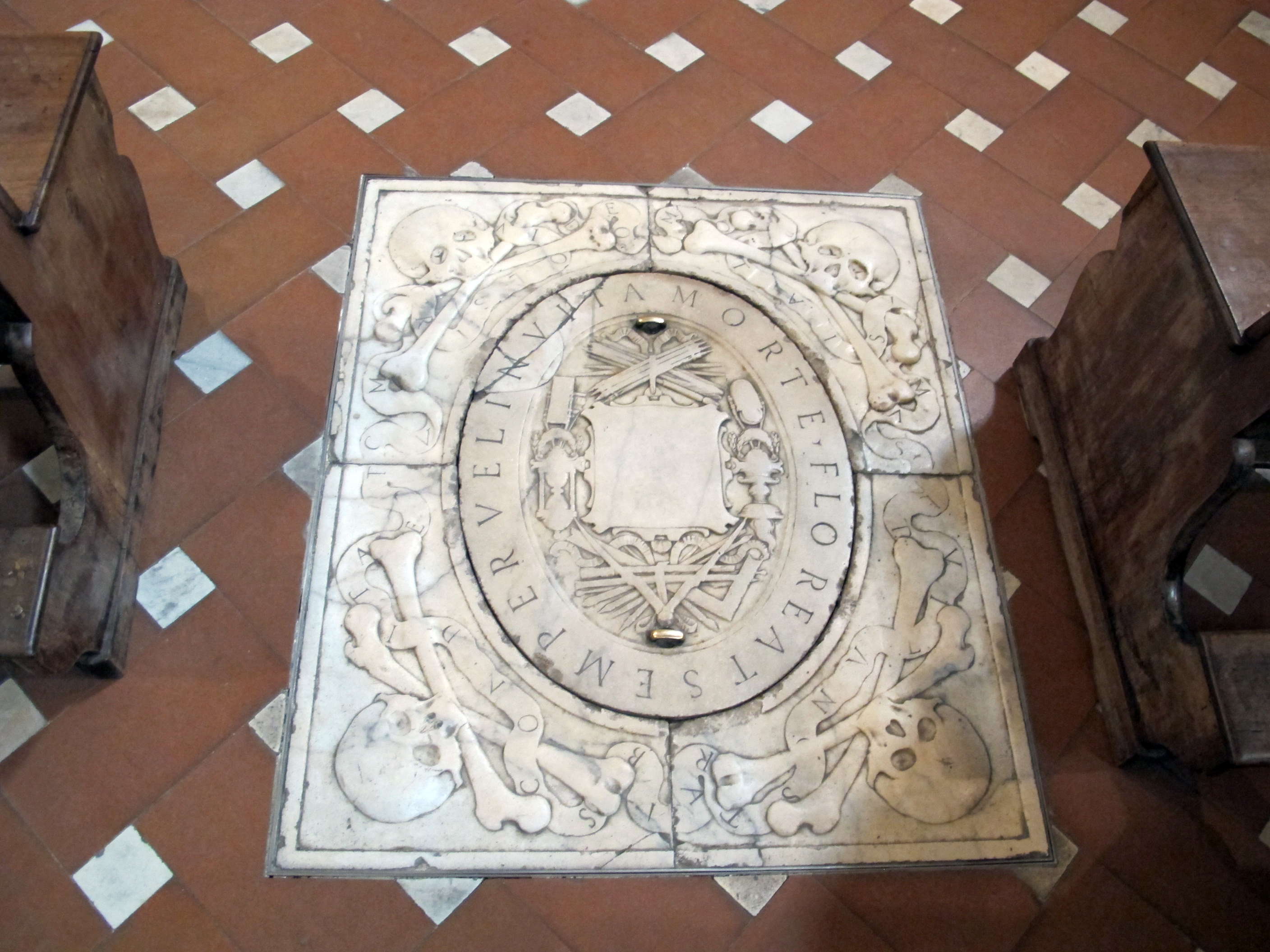 Lasta della tomba comune degli asrtisti nella Cappella di San Luca alla Santissima Annunziata, Firenze, opera del Montorsoli. Qui vennero sepolti numerosi artisti, da Pontormo al Cellini, dallo stesso Montorsoli a Andrea Sansovino. L'ultimo fu Lorenzo Bartolini nel 1848